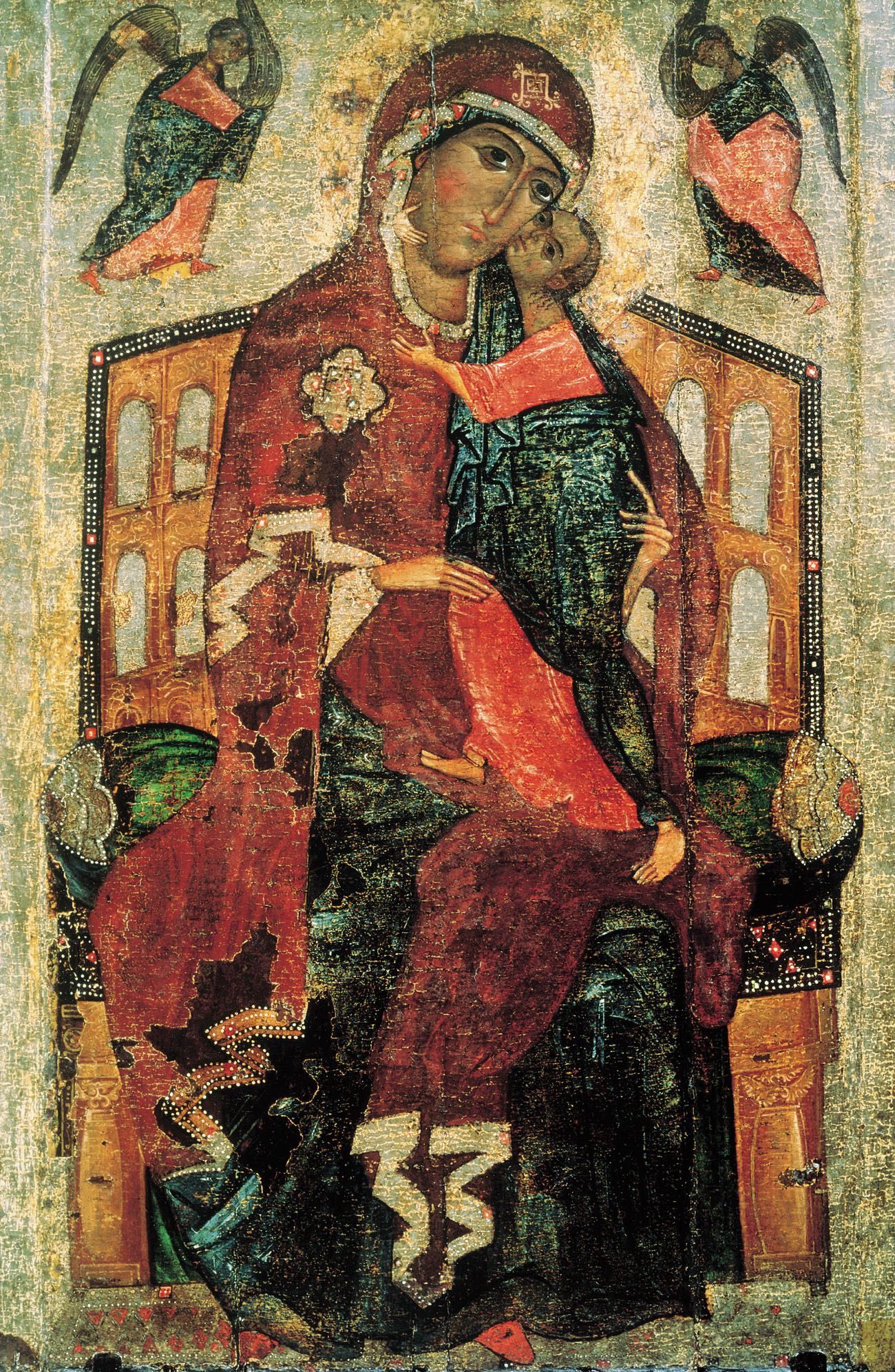 Большая икона Толгской Богоматери (так называемая Толгская I) Последняя четверть XIII в. 140 × 92 см Государственная Третьяковская Галерея, Москва, Россия Инв. 12875 Из Воздвиженской церкви Толгского монастыря близ Ярославля По-видимому, большая икона Толгской Богоматери была особо почитаемым образом, так как существуют две ее полуфигурные реплики: так называемые «Толгская II» и «Толгская III».